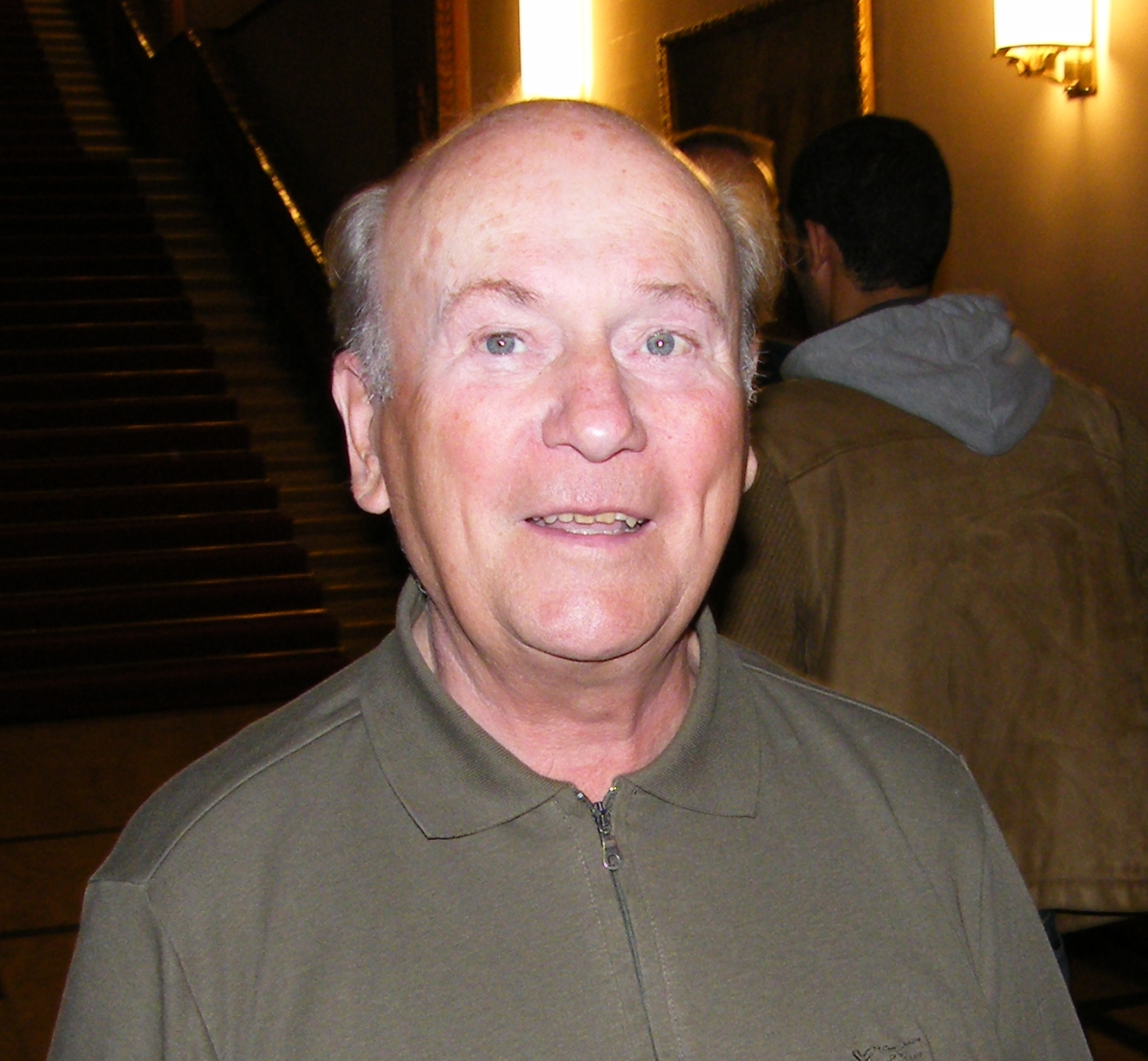 Horst Rittner bei der 3. Runde der Schach-Bundesliga 2008/09 im Rathaus Schöneberg in Berlin